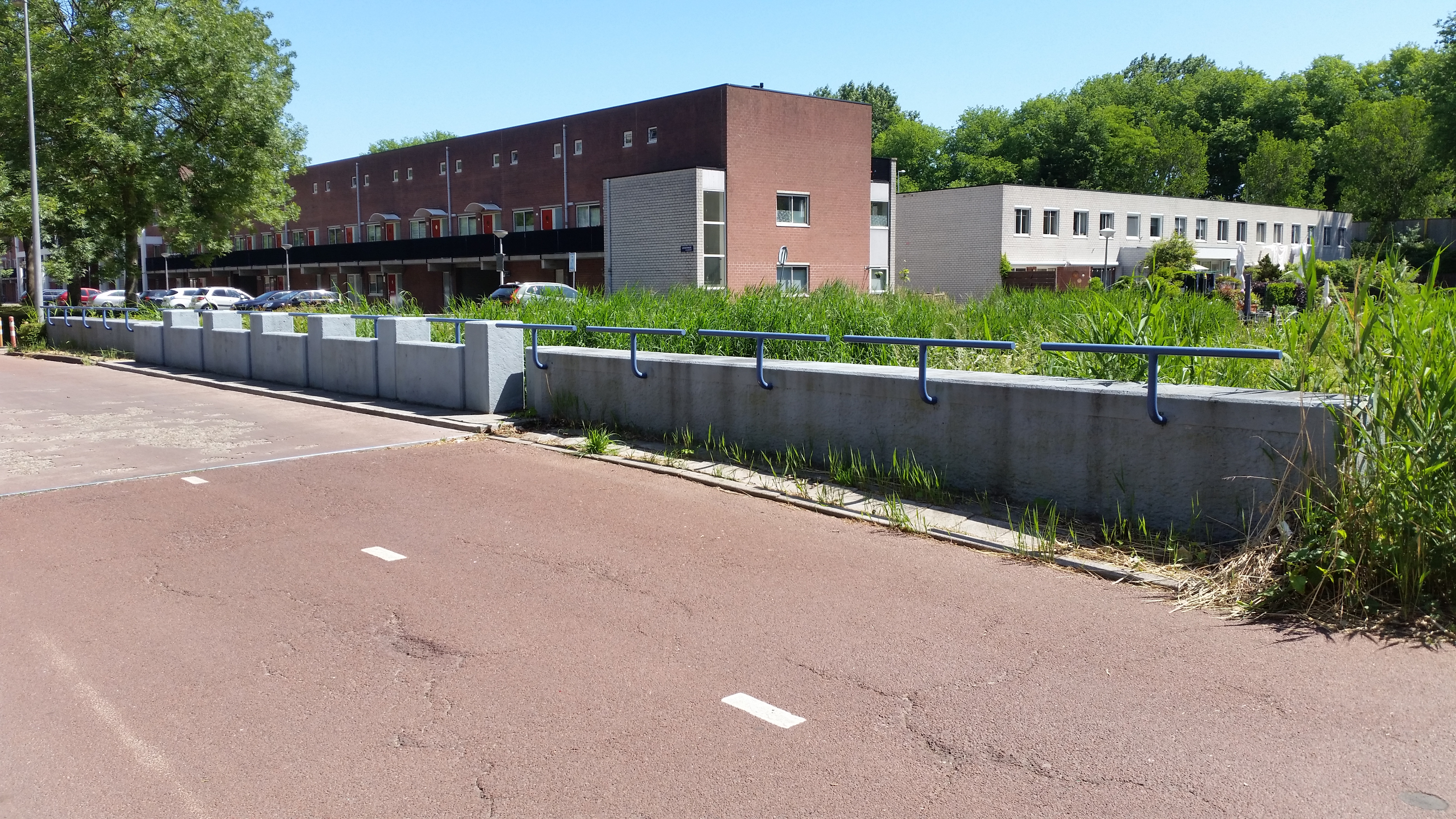 Impressie van de Loenermarkbrug (brug 935) in Amsterdam-Noord.